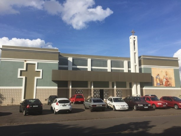 Paróquia São José Operário, no bairro Vera Cruz em Passo Fundo - RS